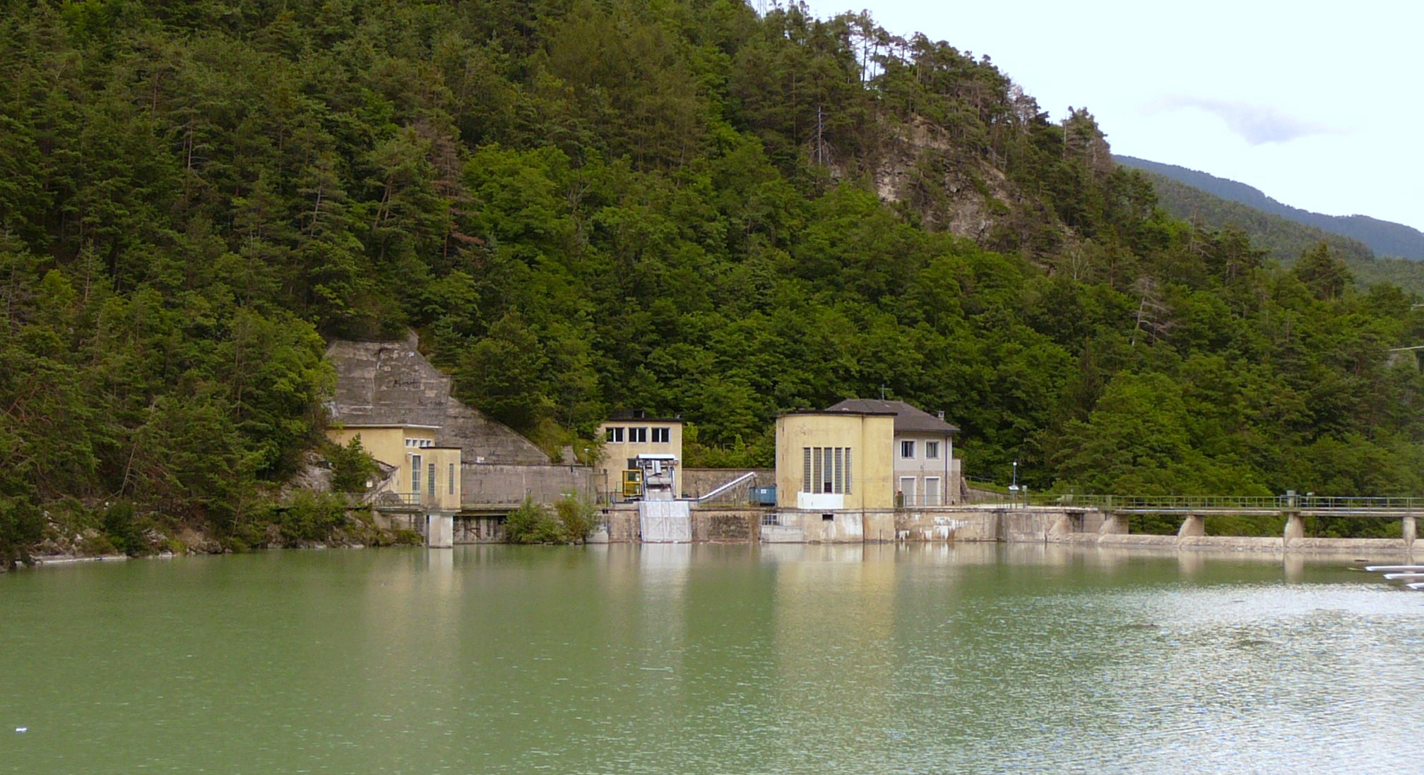 Lo sbarramento della diga di fortezza